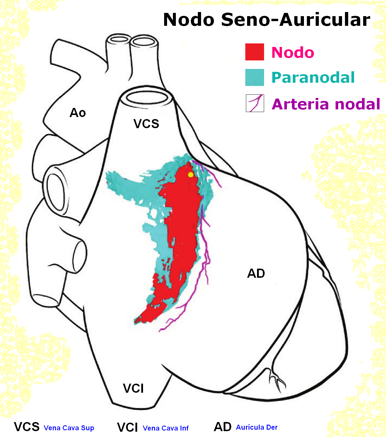 Figura 4.A._ Comparison of existing and current models of the sino atrial node. (A)_Imagen de la pared epicárdica de la auricula derecha. Se muestra el contorno del Nodo Seno-Auricular (NSA)construído a partir de secciones teñidas immunohistoquímicamente, proyectadas sobre la superficie de un corazón de conejo. Pueden verse la zona interna o Nodal (en rojo) y la zona Perinodal que la circunda (en azul). El nodo está lejos de ser una estructura redondeada y bien delimitada, como se dibuja esquemáticamente en los libros de texto. Se observa también la arteria del nodo en su disposición habitual (en violeta). AD aurícula derecha, VCS vena cava superior, VCI vena cava inferior, AO aorta.